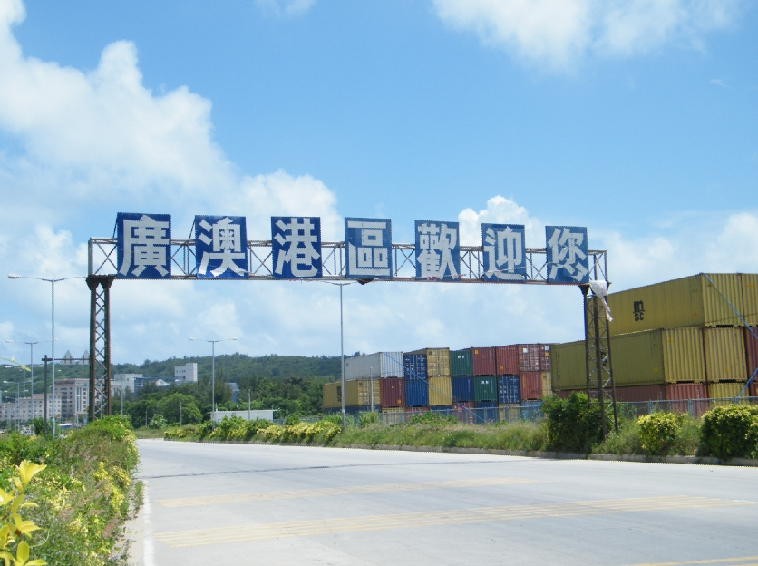 广澳港区欢迎您